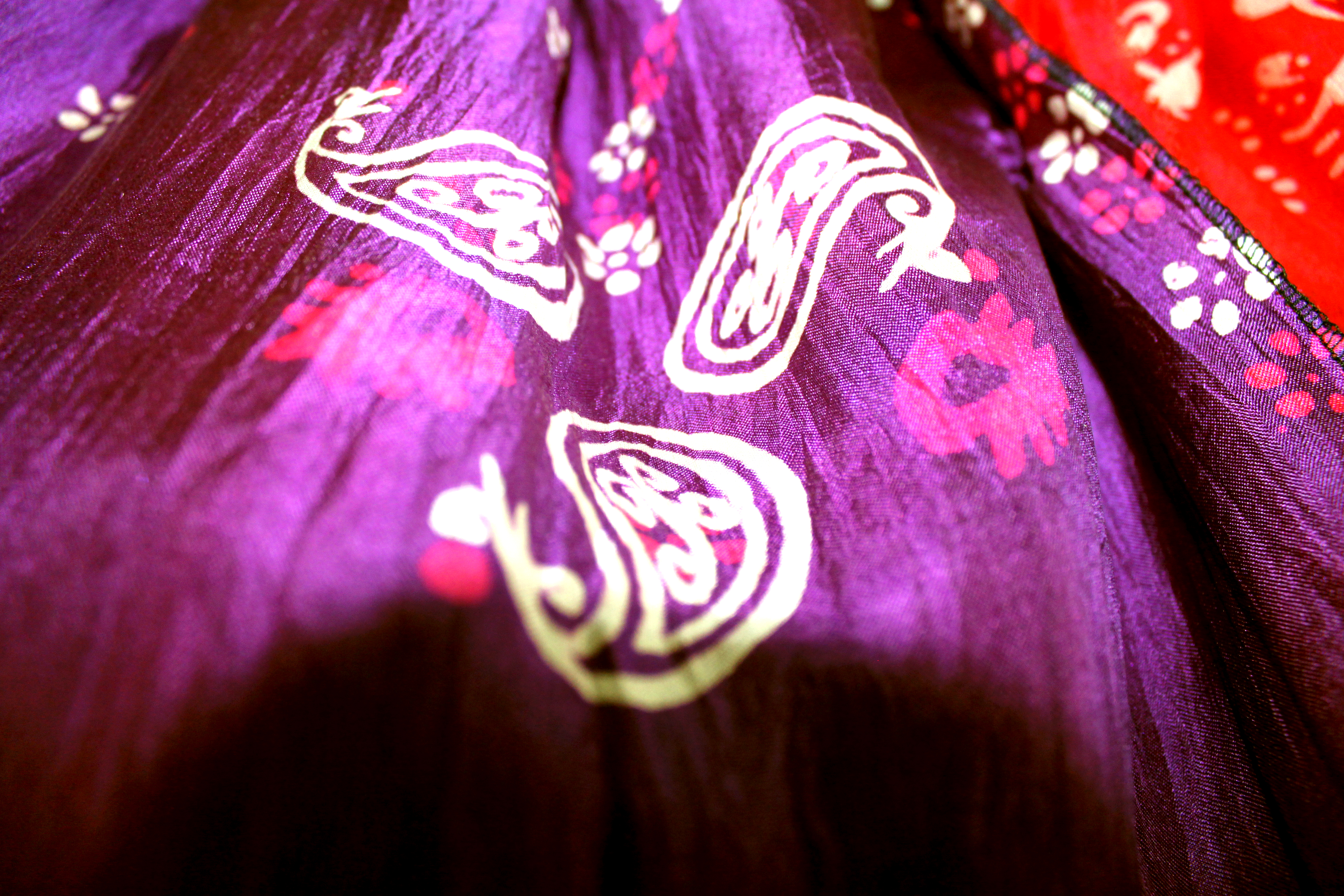 Azərbaycan kəlağayısının hazırlanması